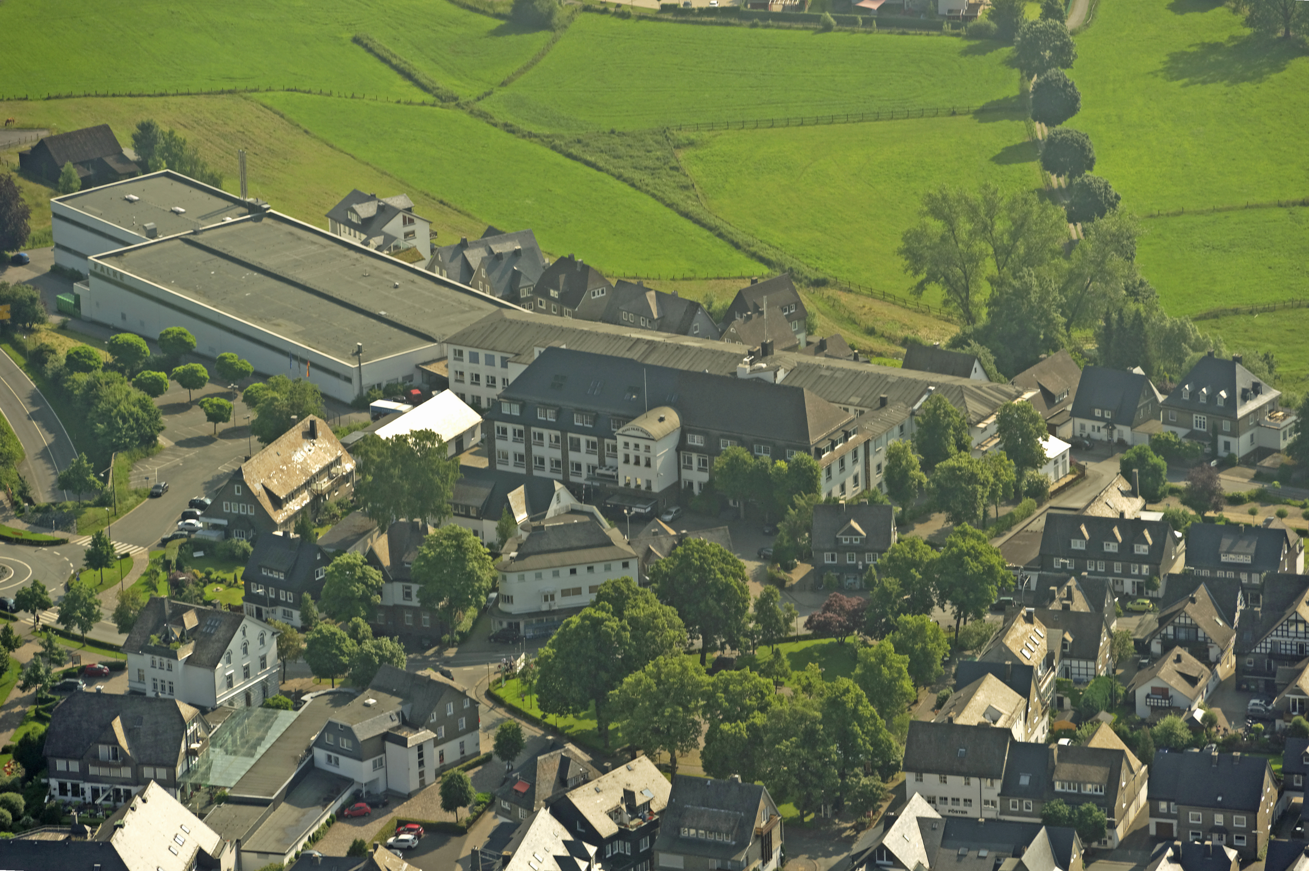 Fotoflug Sauerland-Ost, Schmallenberg, Hauptsitz Firma Falke KGaA